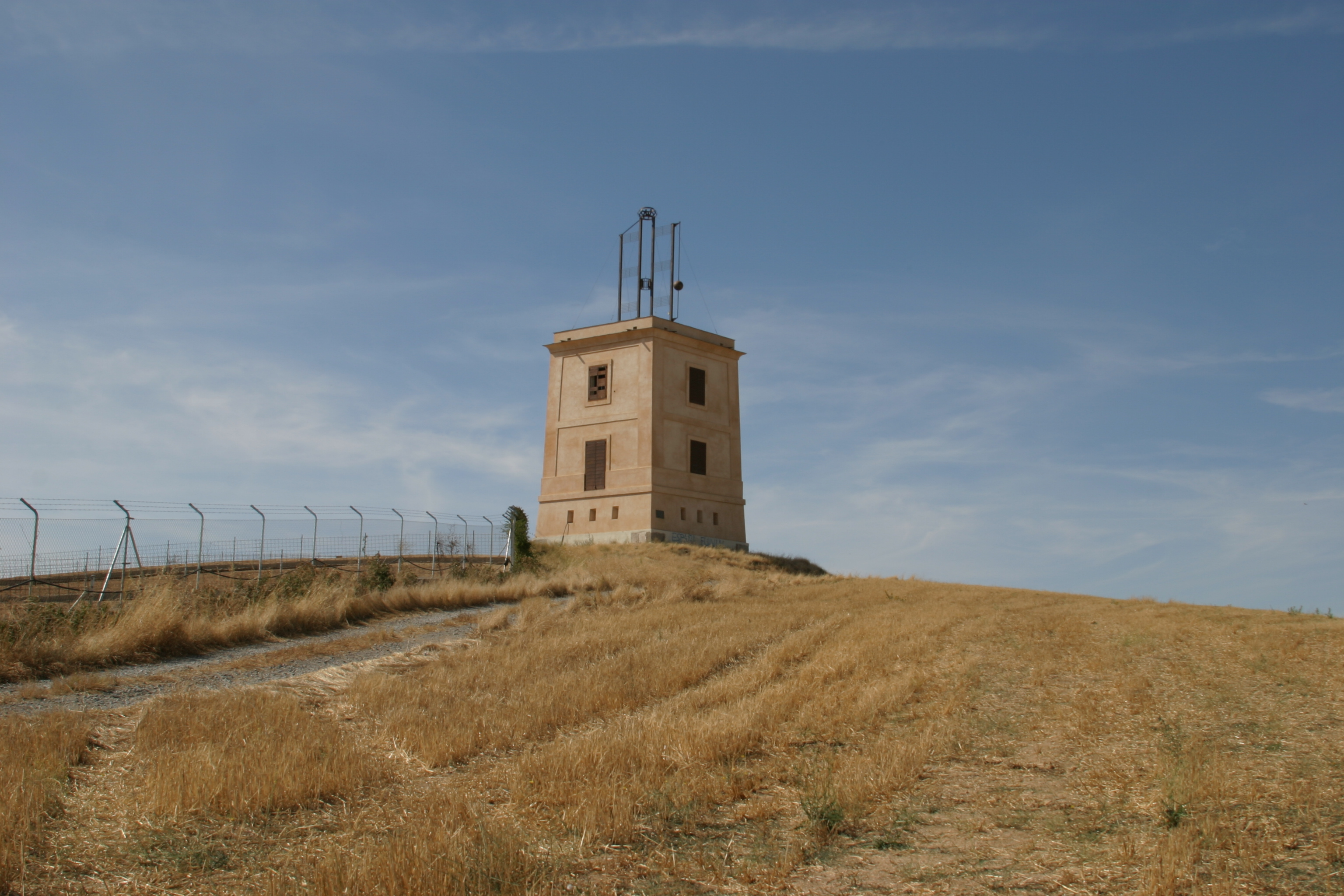 Torre de telégrafo restaurada de Arévalo, en Ávila (España).